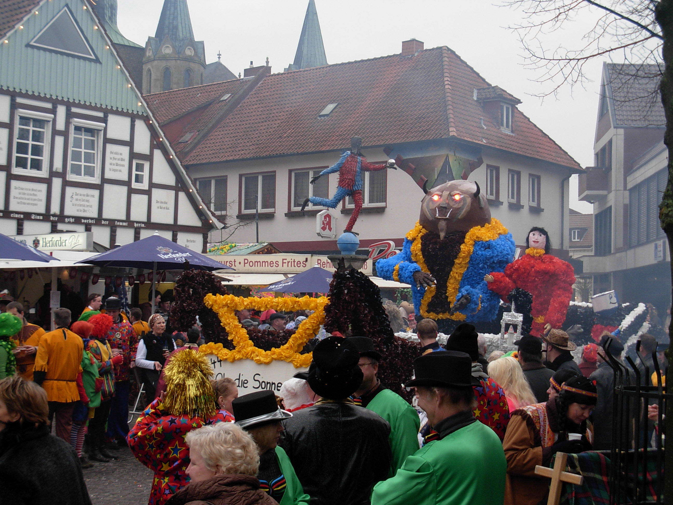 Le Carnaval de Damme en 2008.